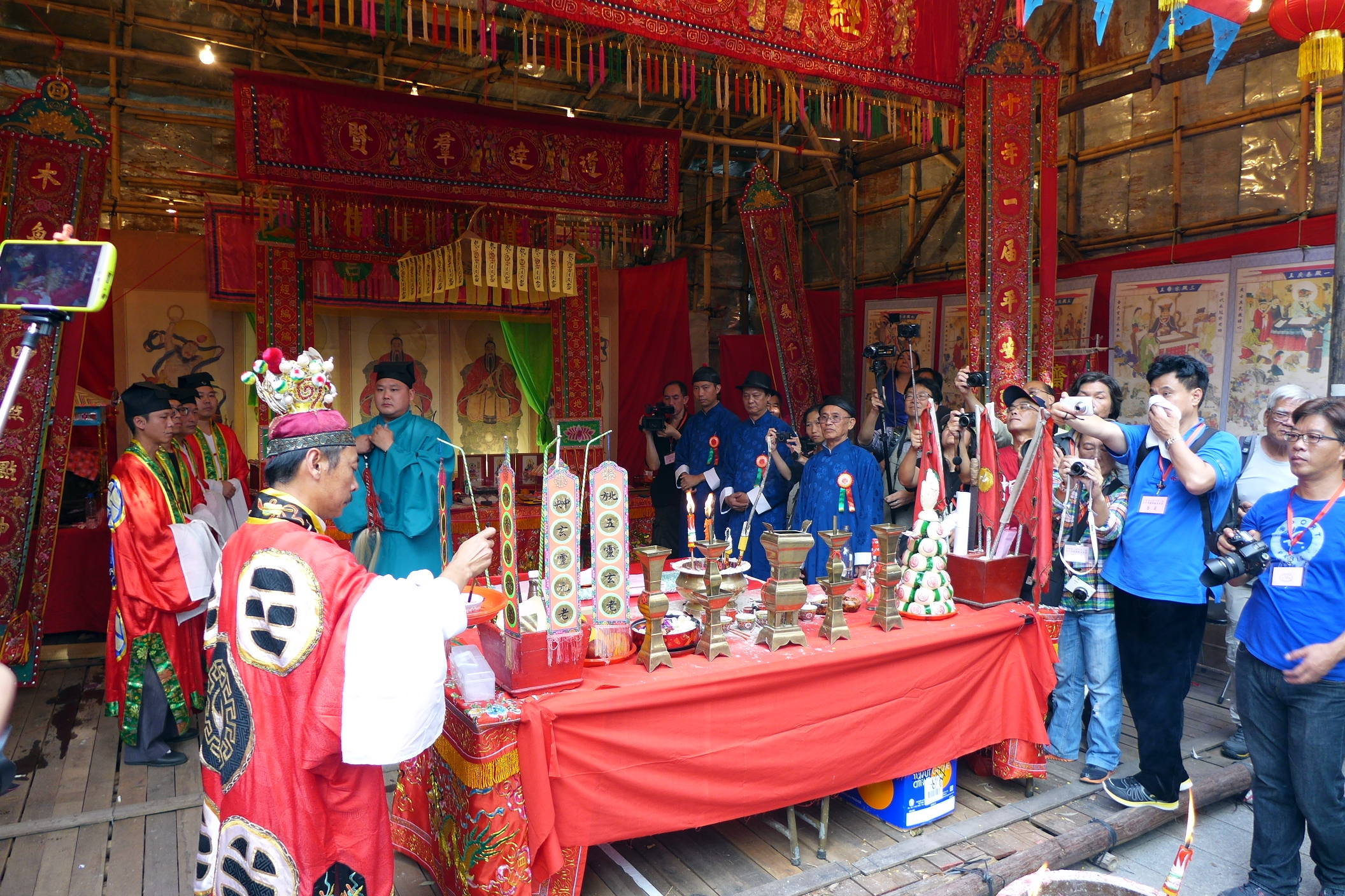 Tin Sam Village Da Jiu Festival in 2016